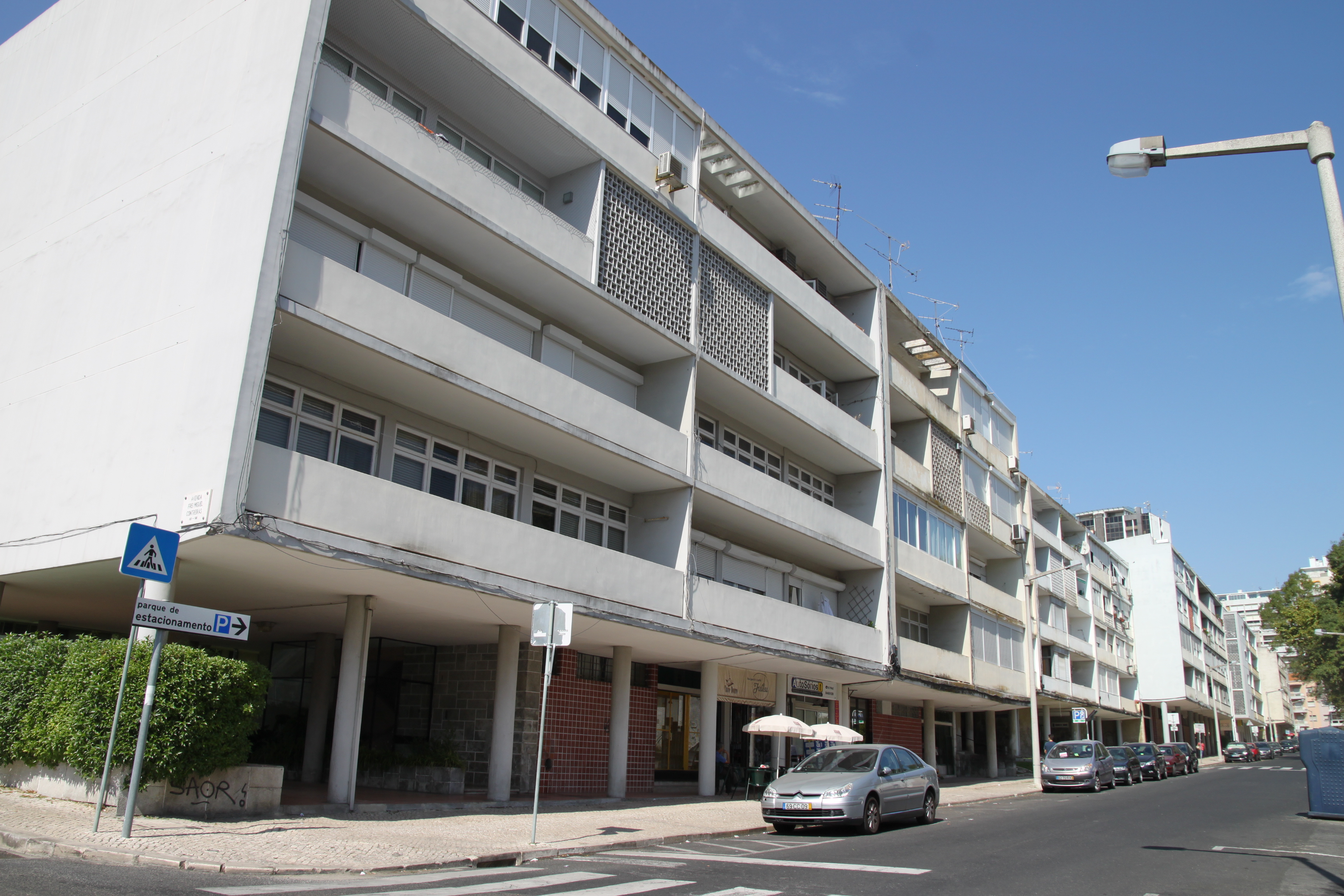 Bairro das Estacas This file was uploaded for Wiki Loves Monuments in Portugal with the unique identifier 97024670.